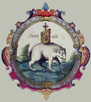 Пермская эмблема, царский титулярник, 1672.